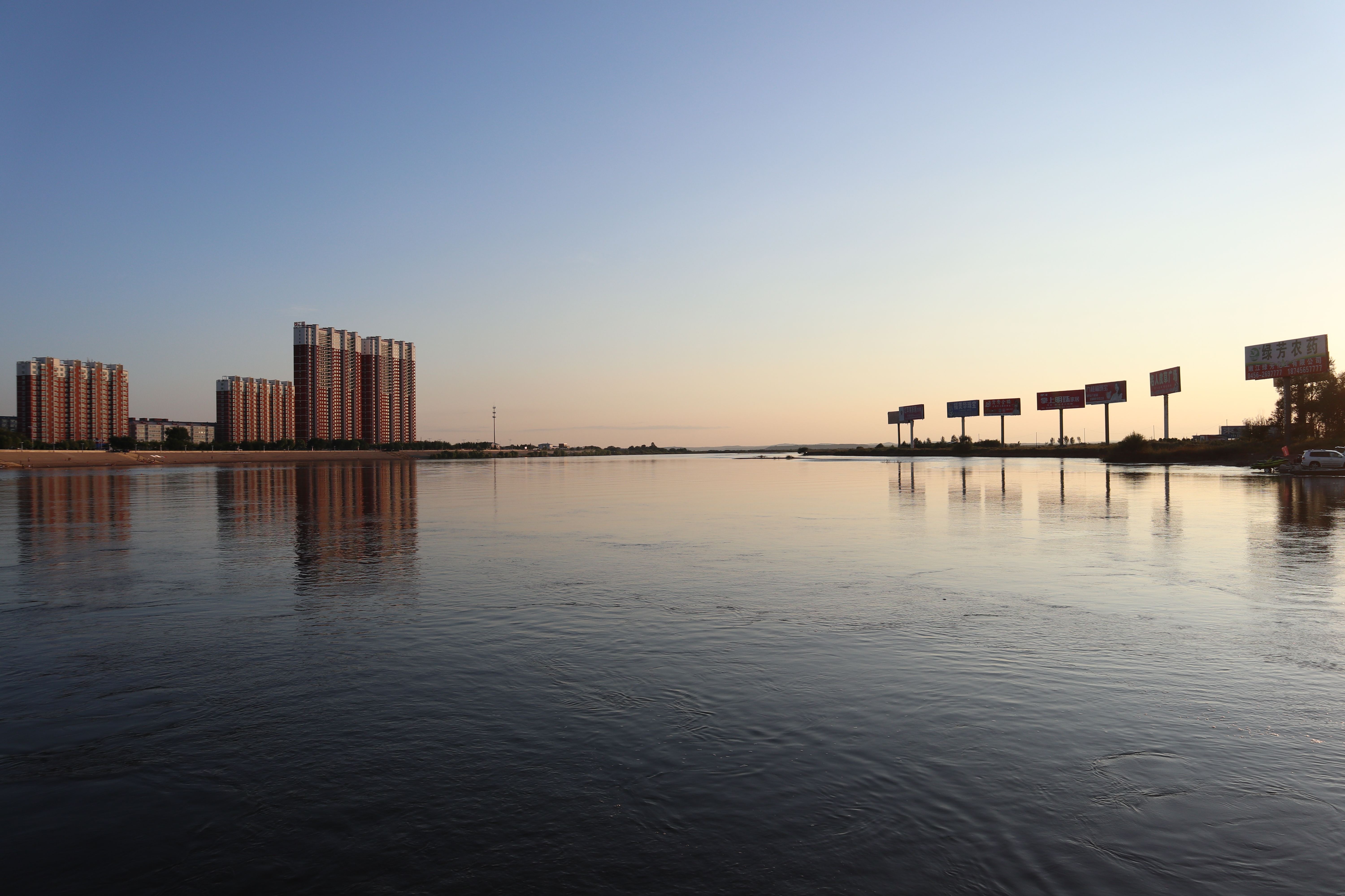 黄昏时分的嫩江，左侧是黑龙江省嫩江市，右侧是内蒙古自治区莫力达瓦达斡尔族自治旗。